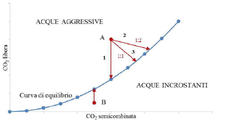 Equilibrio bicarbonatico